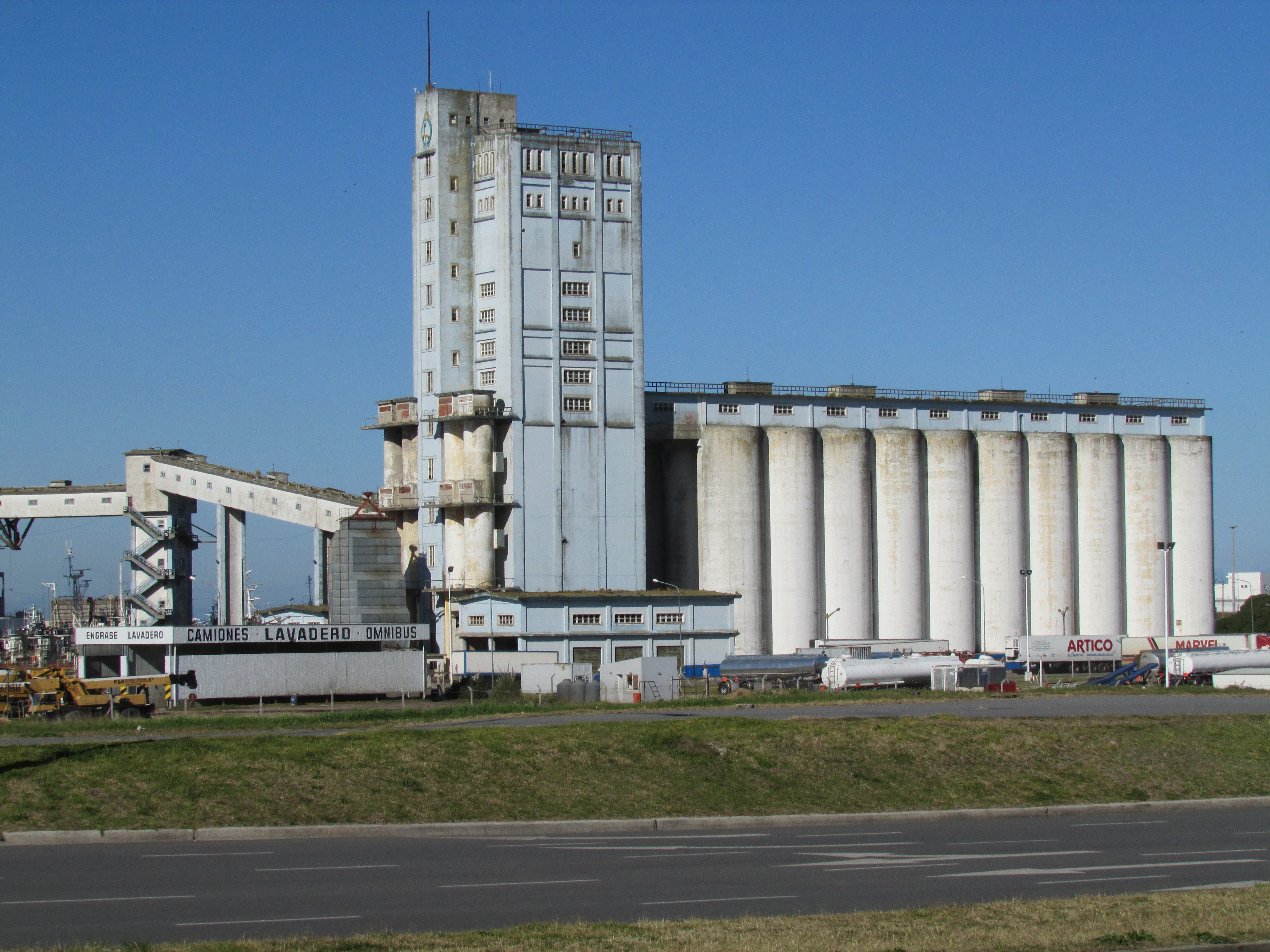 Silos del puerto de Mar del Plata, provincia de Buenos Aires, Argentina.